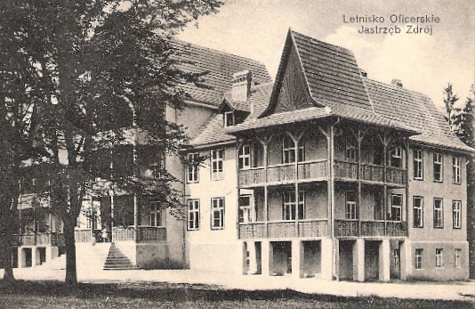 Letnisko oficerskie w Jastrzębiu-Zdroju, archiwalna pocztówka